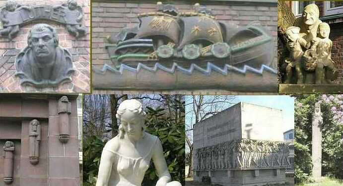 Werke des Bildhauers Richard Kuöhl in HamburgObere Reihe: Lutherkopf an der Auferstehungskirche am Tieloh in Barmbek-Nord; Kogge an der Finanzdeputation am Gänsemarkt in der Neustadt; „Hänsel, Gretel und Hexe“ in der Straße Fiefstücken in WinterhudeUntere Reihe: Hauseingang in der Kieler Straße in Altona; „Die Knieende“ auf dem Friedhof Ohlsdorf; Kriegerdenkmal am Dammtor in der Neustadt; Marienstatue auf dem Friedhof Ohlsdorf